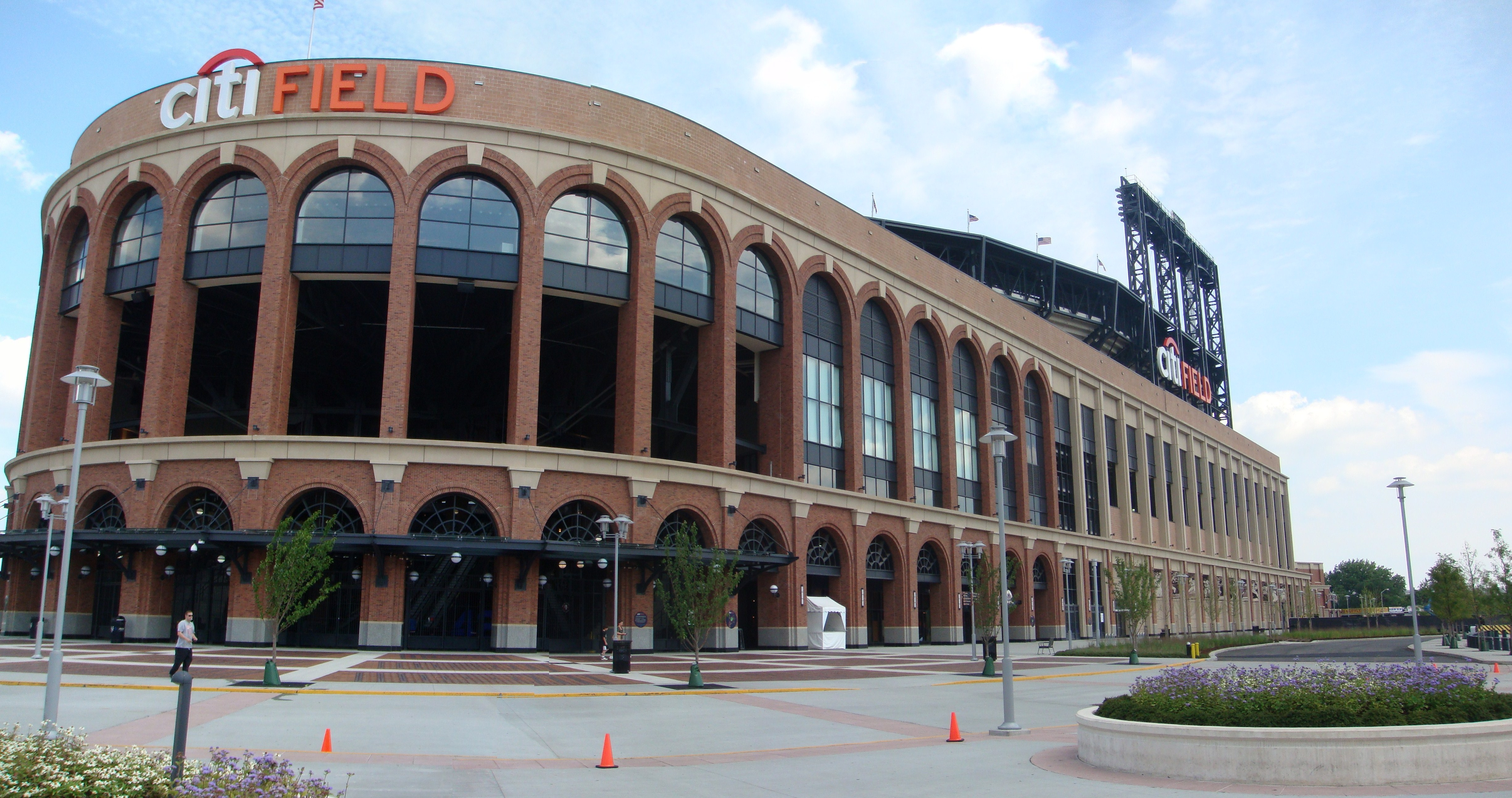 Citi Field